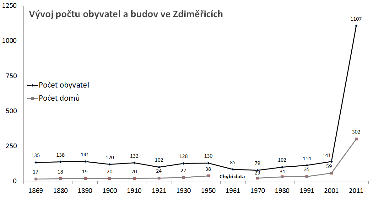 Vývoj počtu obyvatel ve Zdiměřicích, části města Jesenice ležící v okrese Praha-západ, Česko. Založeno na datech získaných z historických údajů a ze sčítání obyvatel, domů a bytů 1